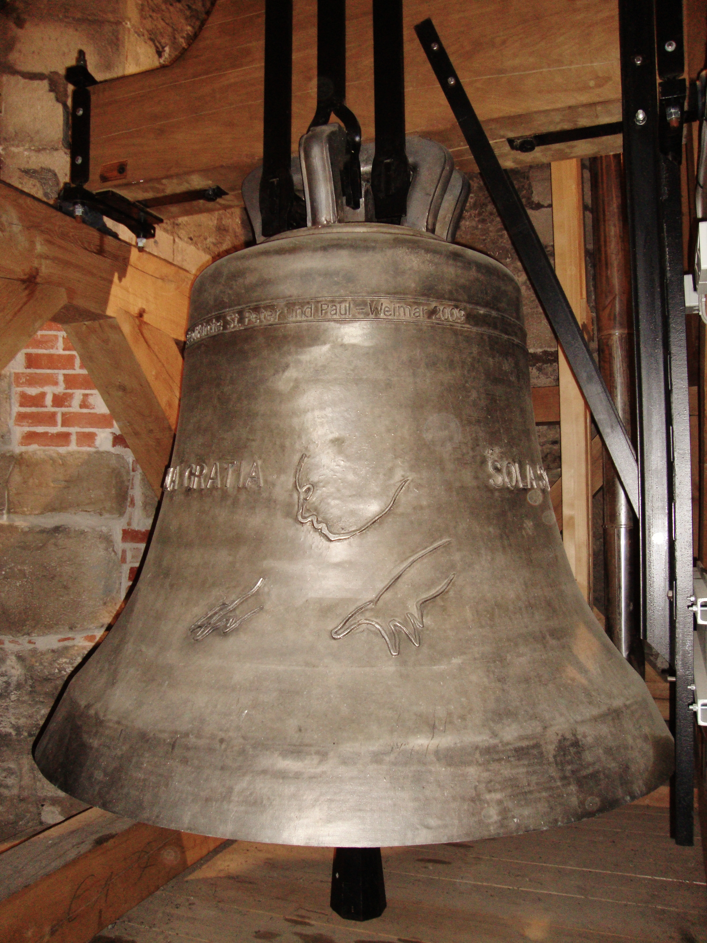 Weimar, Stadtkirche St. Peter und Paul: Lutherglocke von 2009